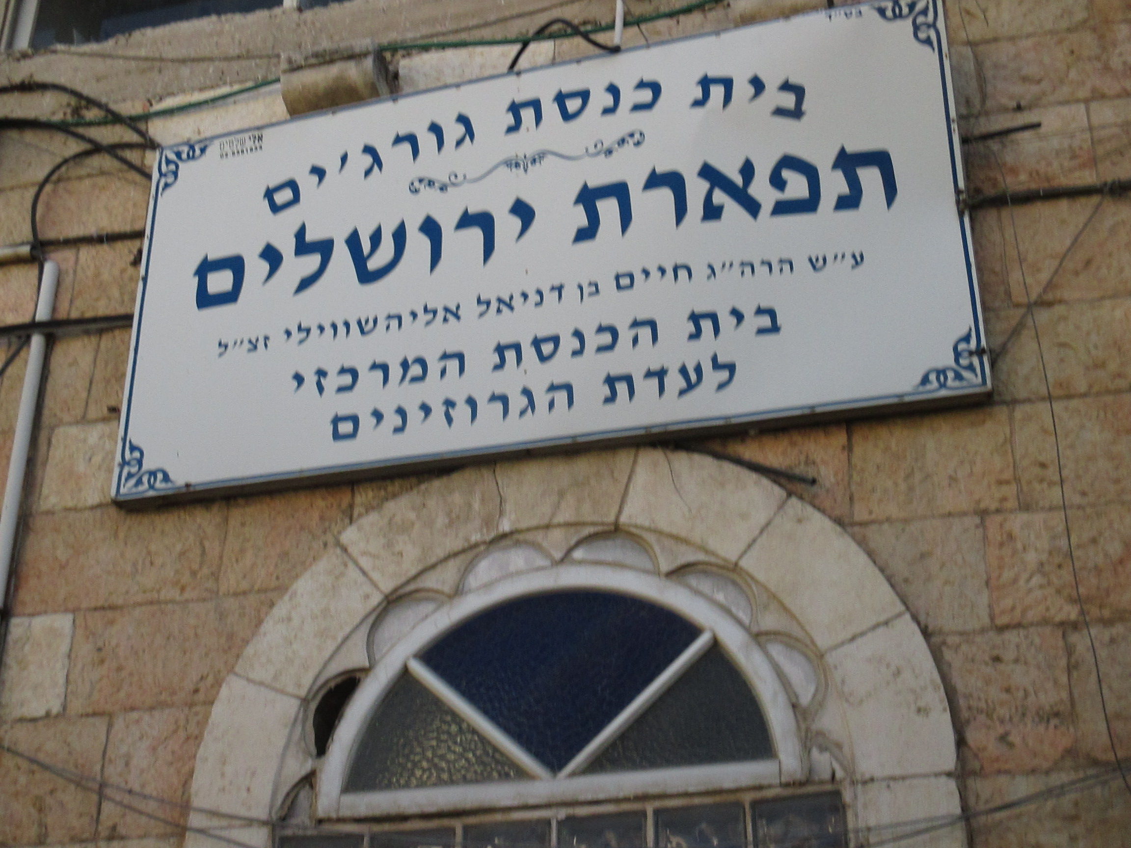 בית הכנסת המרכזי של עולי גרוזיה בירושלים